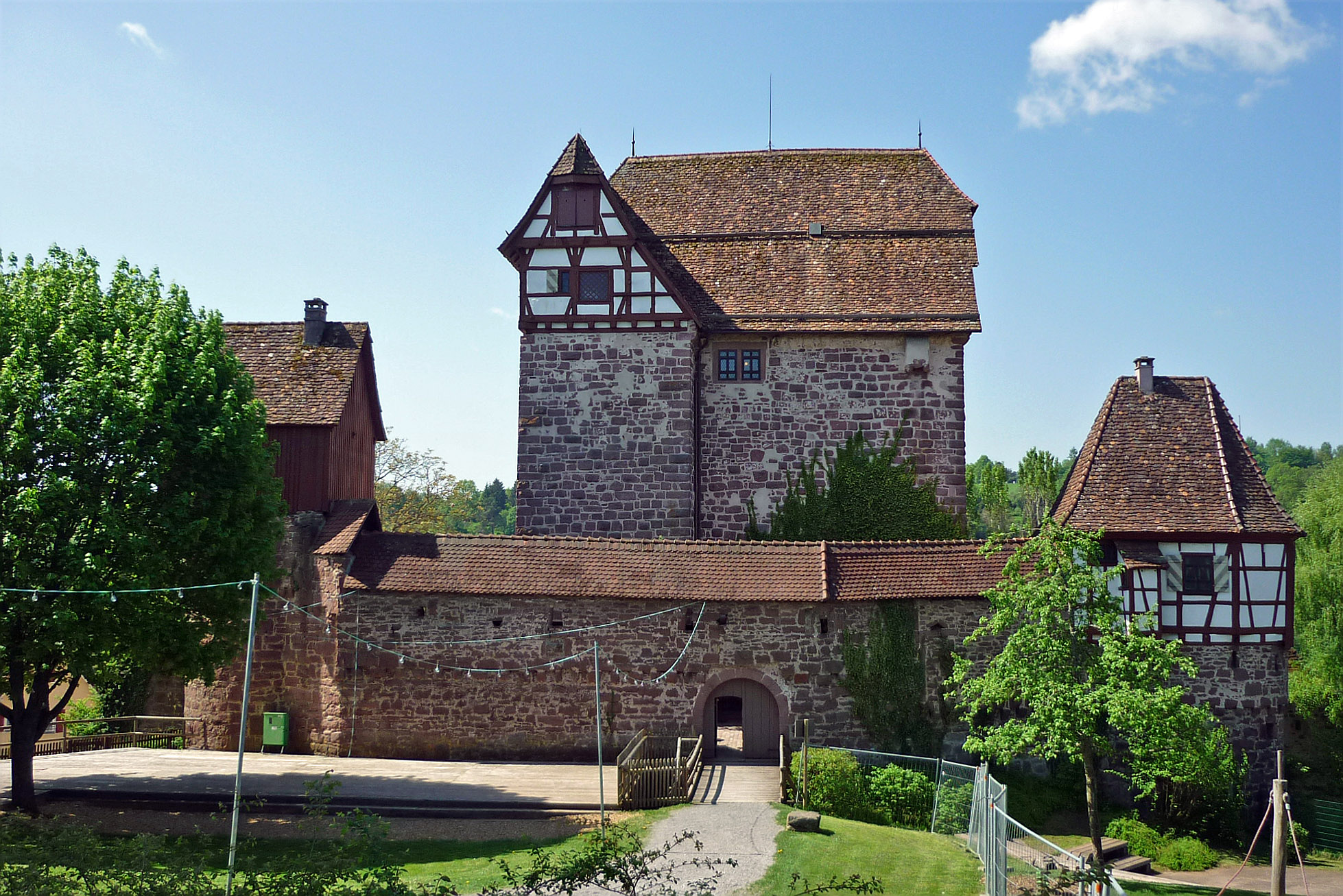 Altensteiger Schloss in Altensteig im Lkr. Calw (Württemberg)